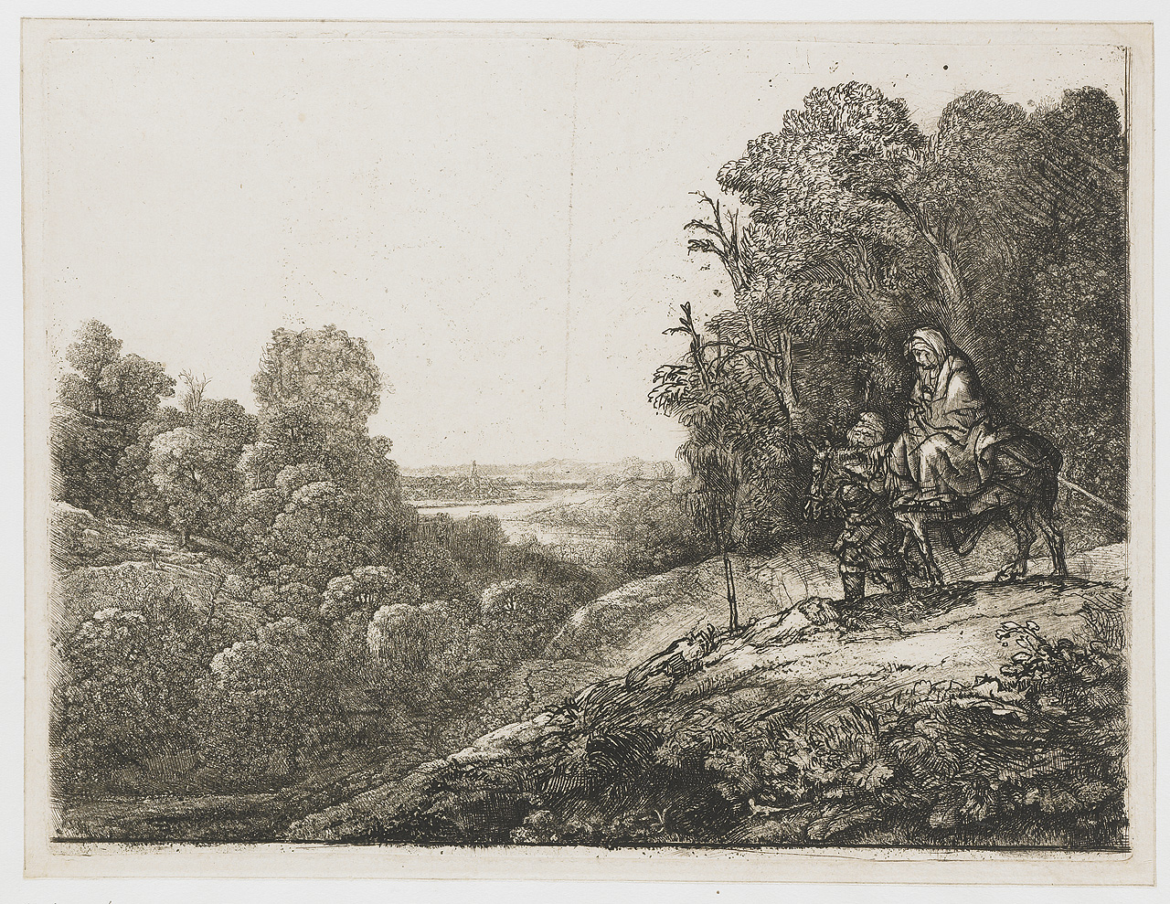 Рембрандт після Геркулеса Сегерса, Втеча святої родини у Єгипет, офорт